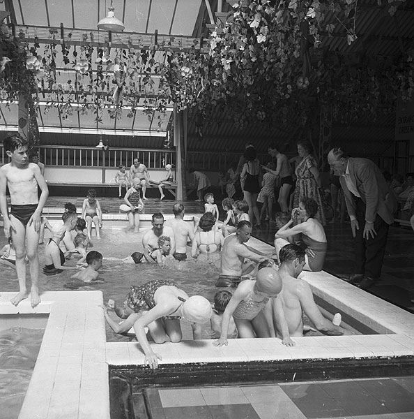 Teitl Cymraeg/Welsh title: Gwersyll Gwyliau Butlins ym Mhwllheli Ffotograffydd/Photographer: Geoff Charles (1909-2002) Dyddiad/Date: 6/7/1961 Cyfrwng/Medium: Negydd ffilm / Film negative Cyfeiriad/Reference: (gch24396) Rhif cofnod / Record no.: 3470977 Rhagor o wybodaeth am gasgliad Geoff Charles yn Llyfrgell Genedlaethol Cymru More information about the Geoff Charles Collection at the National Library of Wales Mae ffotograffau Geoff Charles hefyd yn rhan o Broject Europeana Libraries Geoff Charles' photographs also form part of the Europeana Libraries Project